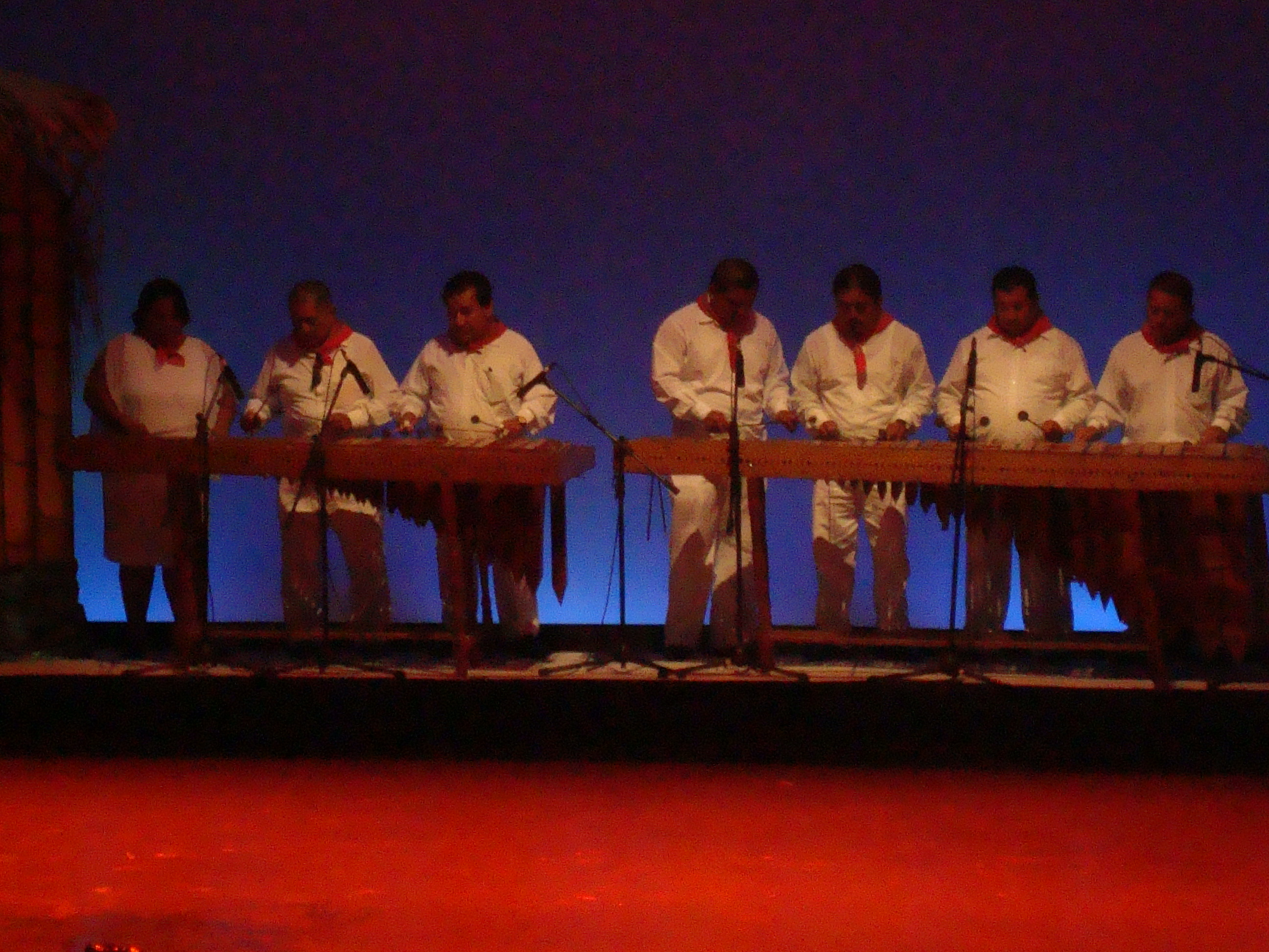 Integrantes de una marimba tradicional del estado de Tabasco, México.